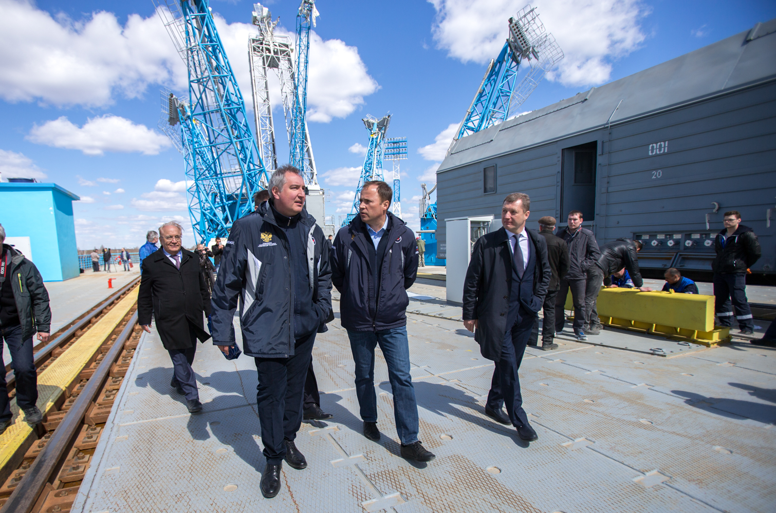 Куратор строительства нового российского космодрома Восточный вице-премьер Дмитрий Рогозин в компании коллег на стартовом комплексе после первого успешного пуска